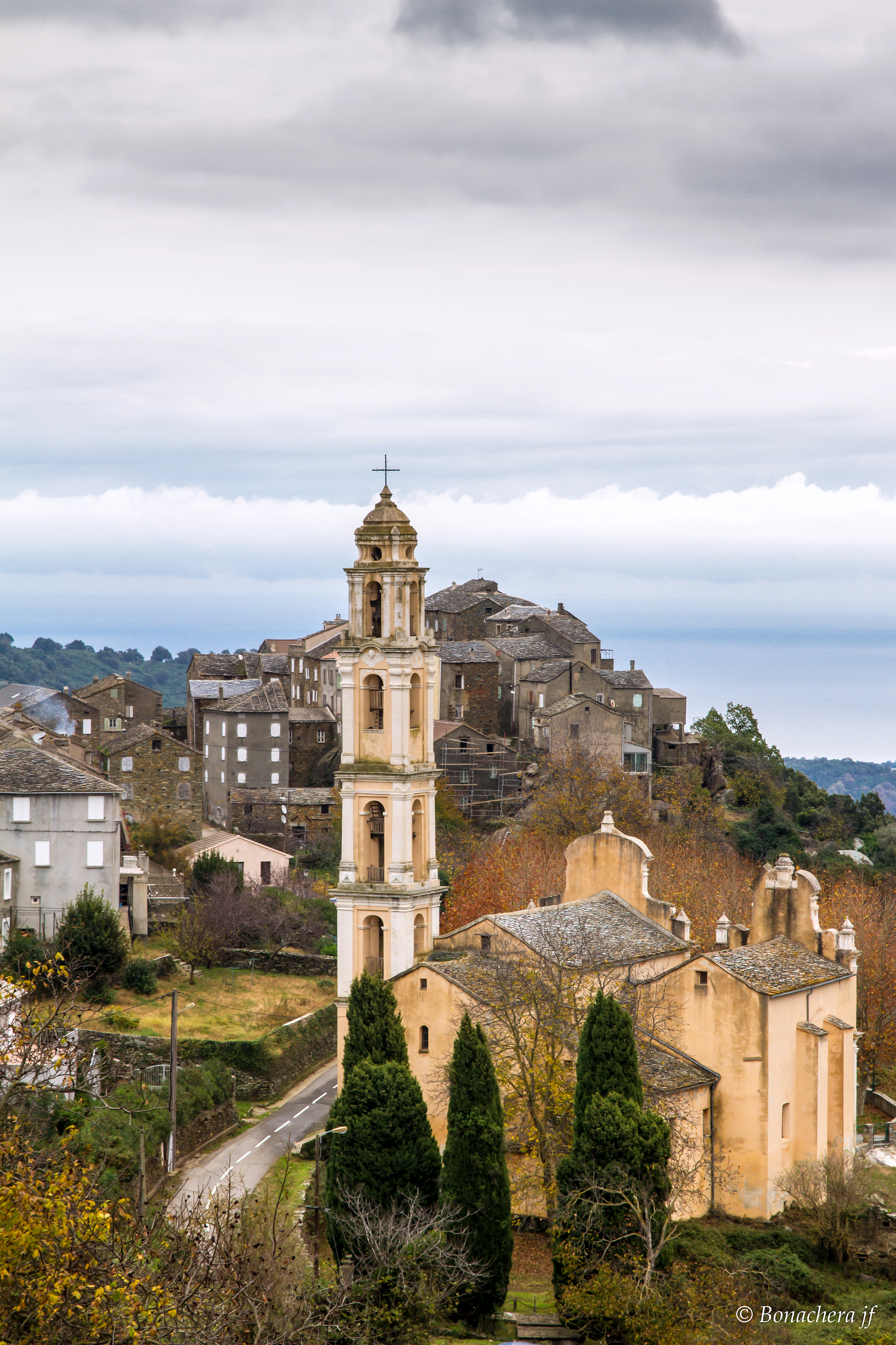 Pietra-di-Verde (Haute-Corse) - l'église Saint-Éloi et le fond village (hameau de Paisolu)